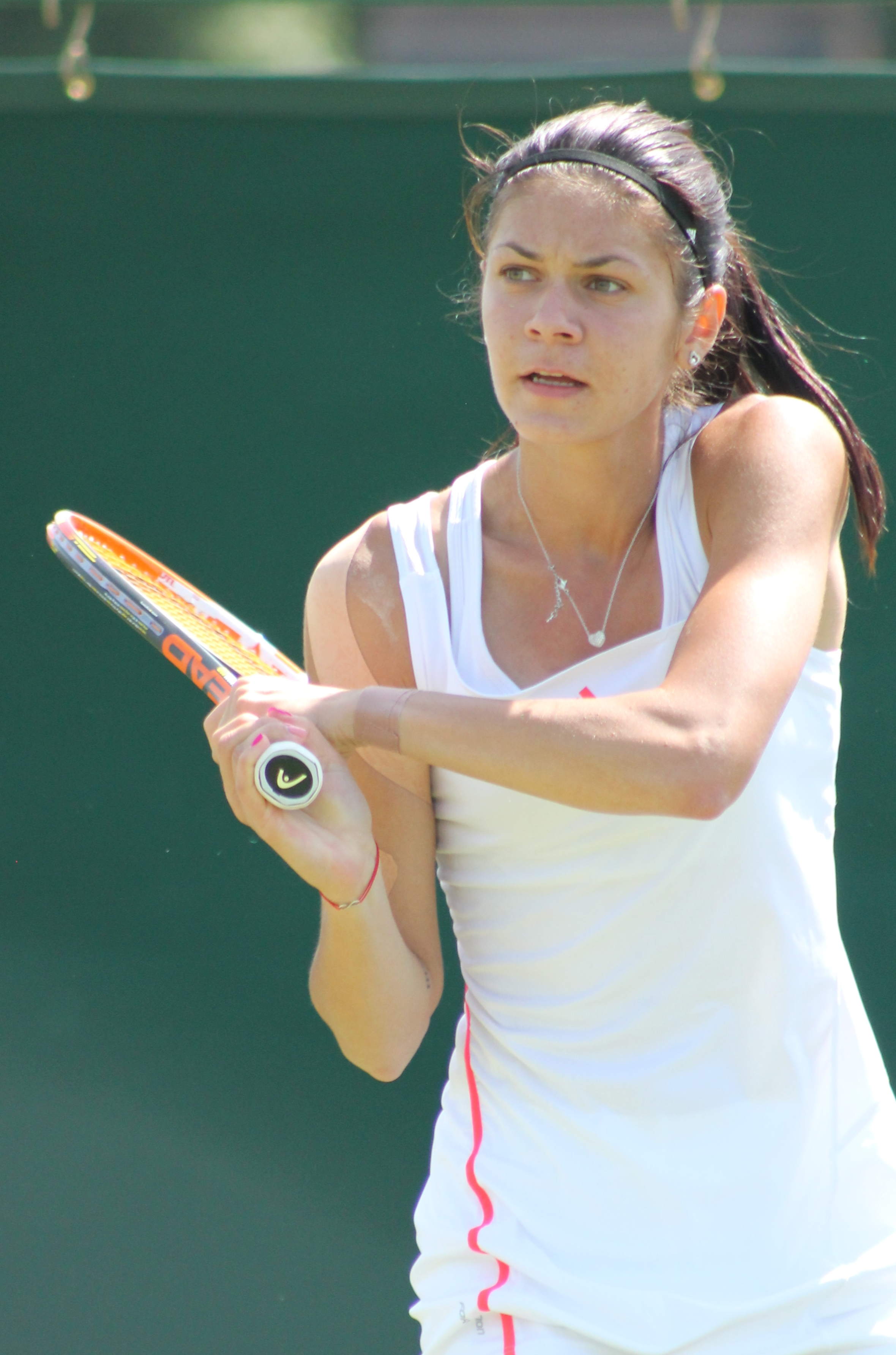 Mitu WMQ14 (4)